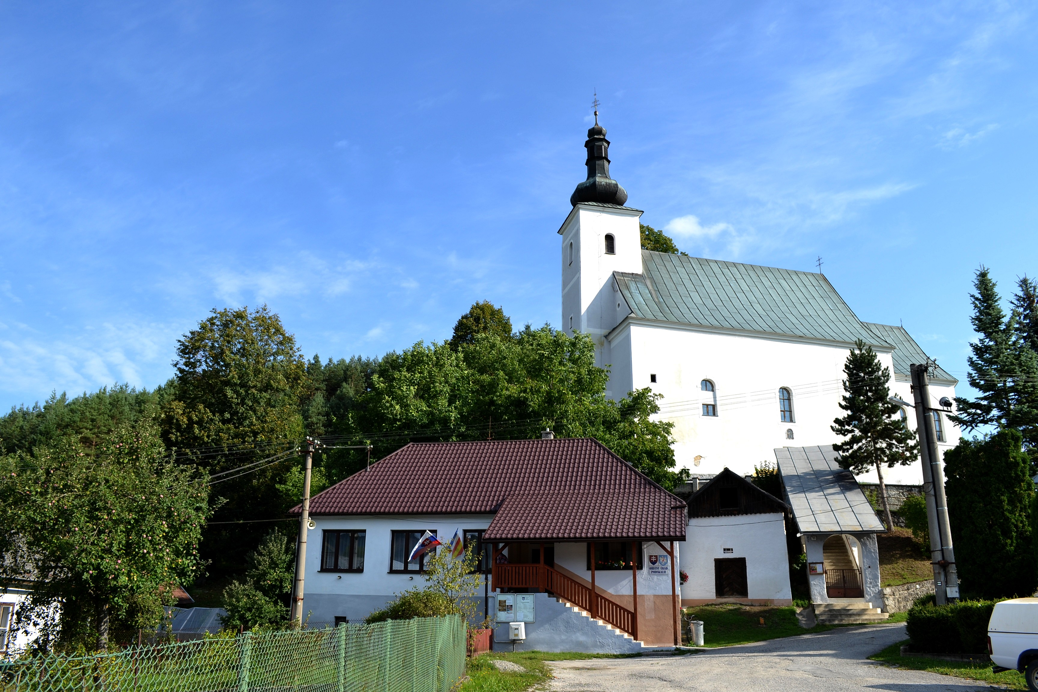 Podskalie (okr. Považská Bystrica), pohľad na centrum obce; v popredí budova obecného úradu, nad ňou sa vypína farský Kostol svätého Martina